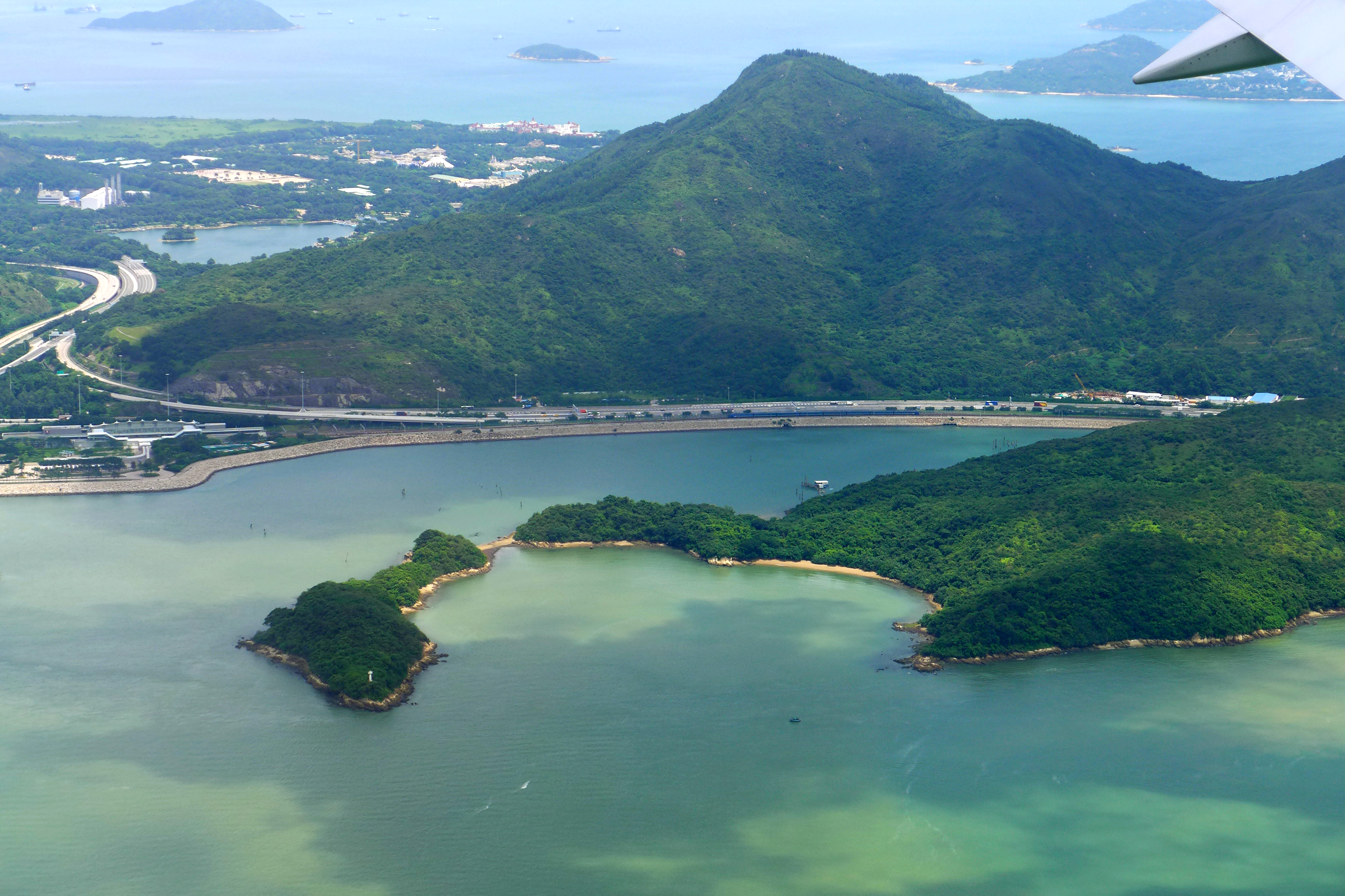 Yam O